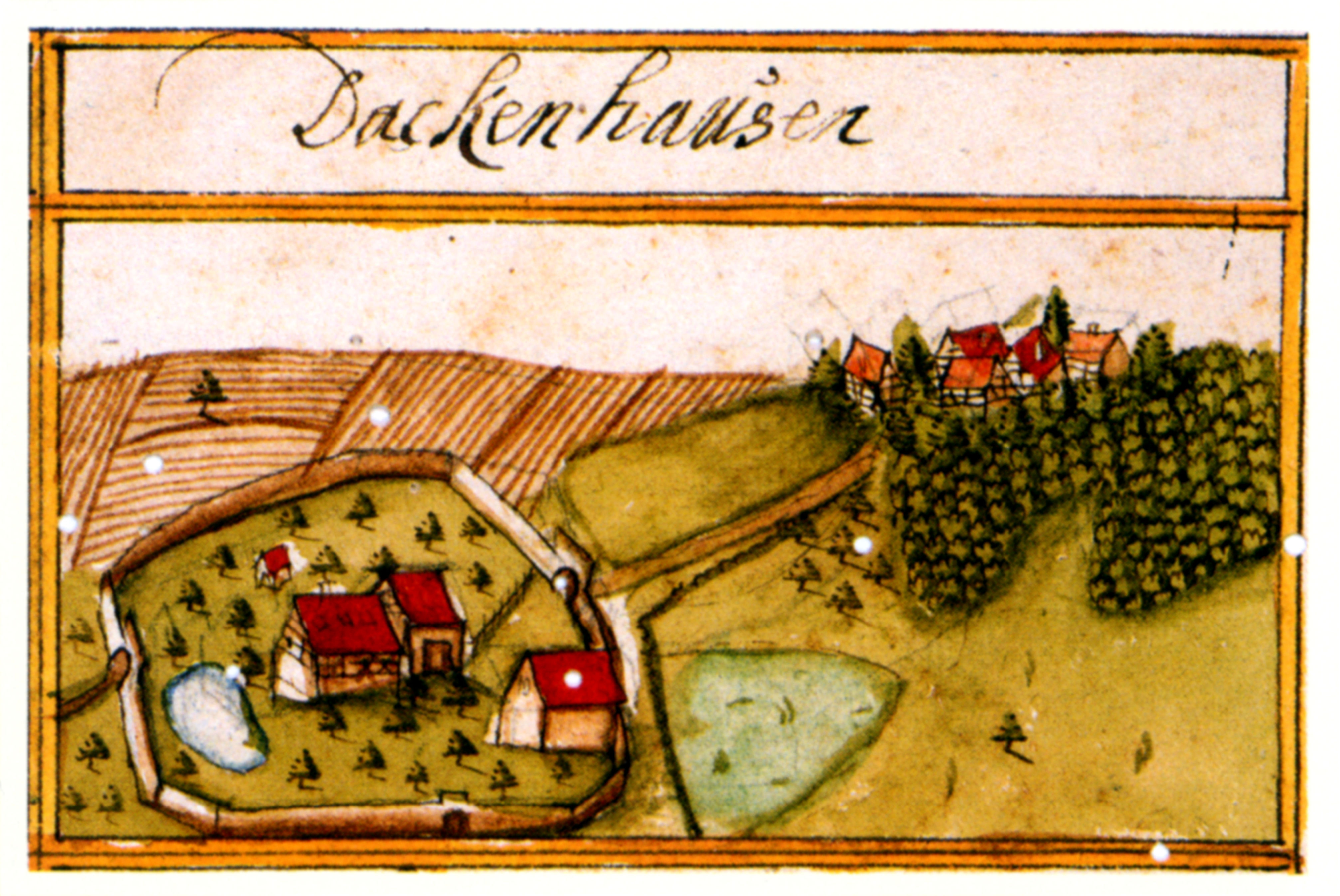 Dackenhausen (heute Tachenhausen, Ortsteil von Oberboihingen) im Kieserschen Forstlagerbuch. (Dies ist eine Bearbeitung des ursprünglichen Scans)